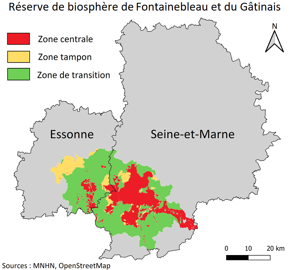 Carte de la surface totale de la réserve de biosphère de Fontainebleau et du Gâtinais